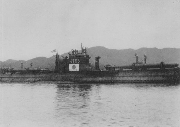 日本海軍 伊第一六五型潜水艦 『伊号第一六五潜水艦』 議論も併せてお読みください。